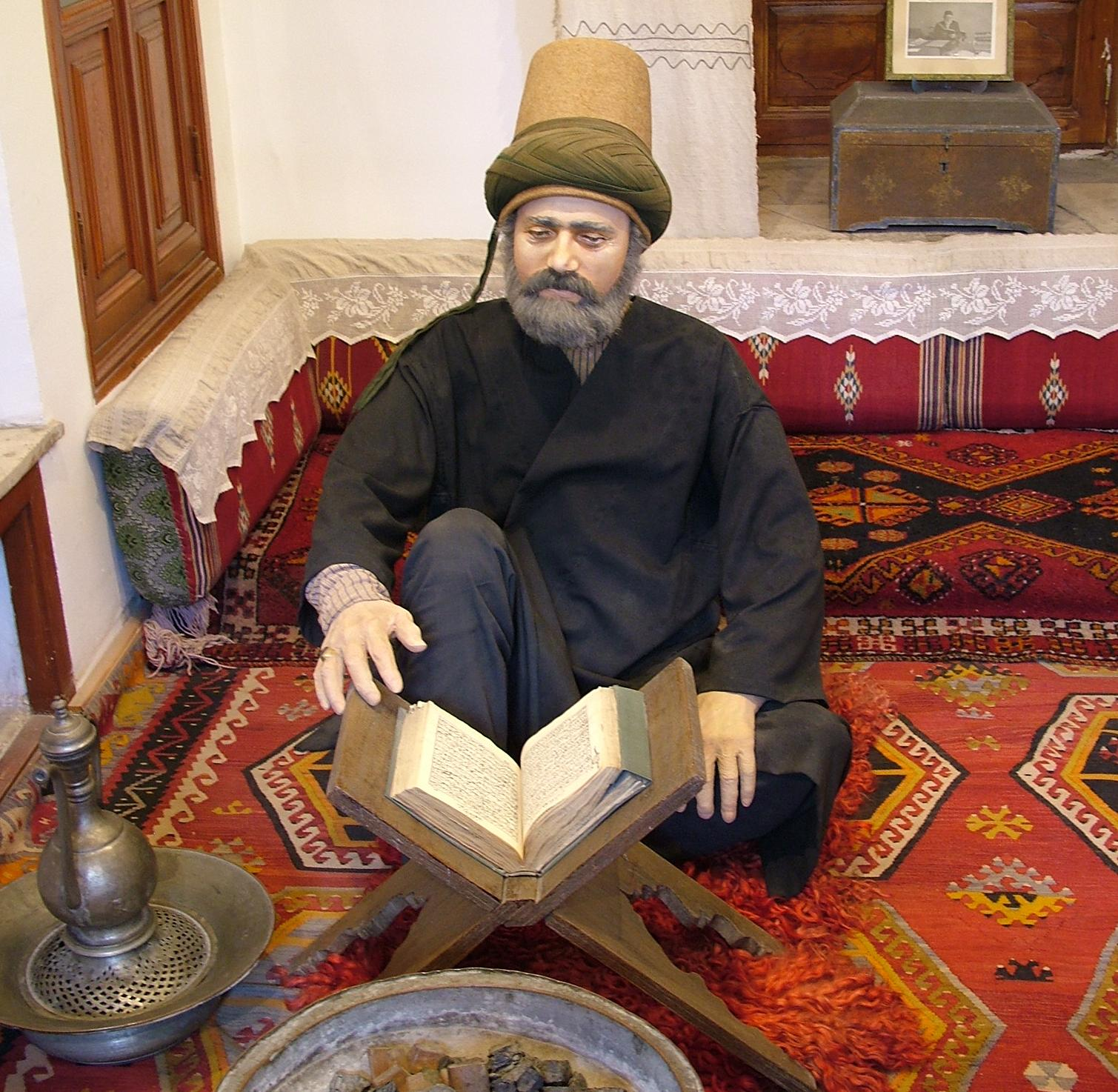 Mevlana Múzeum (Konya, Törökország)